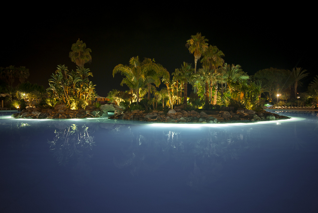 Islas